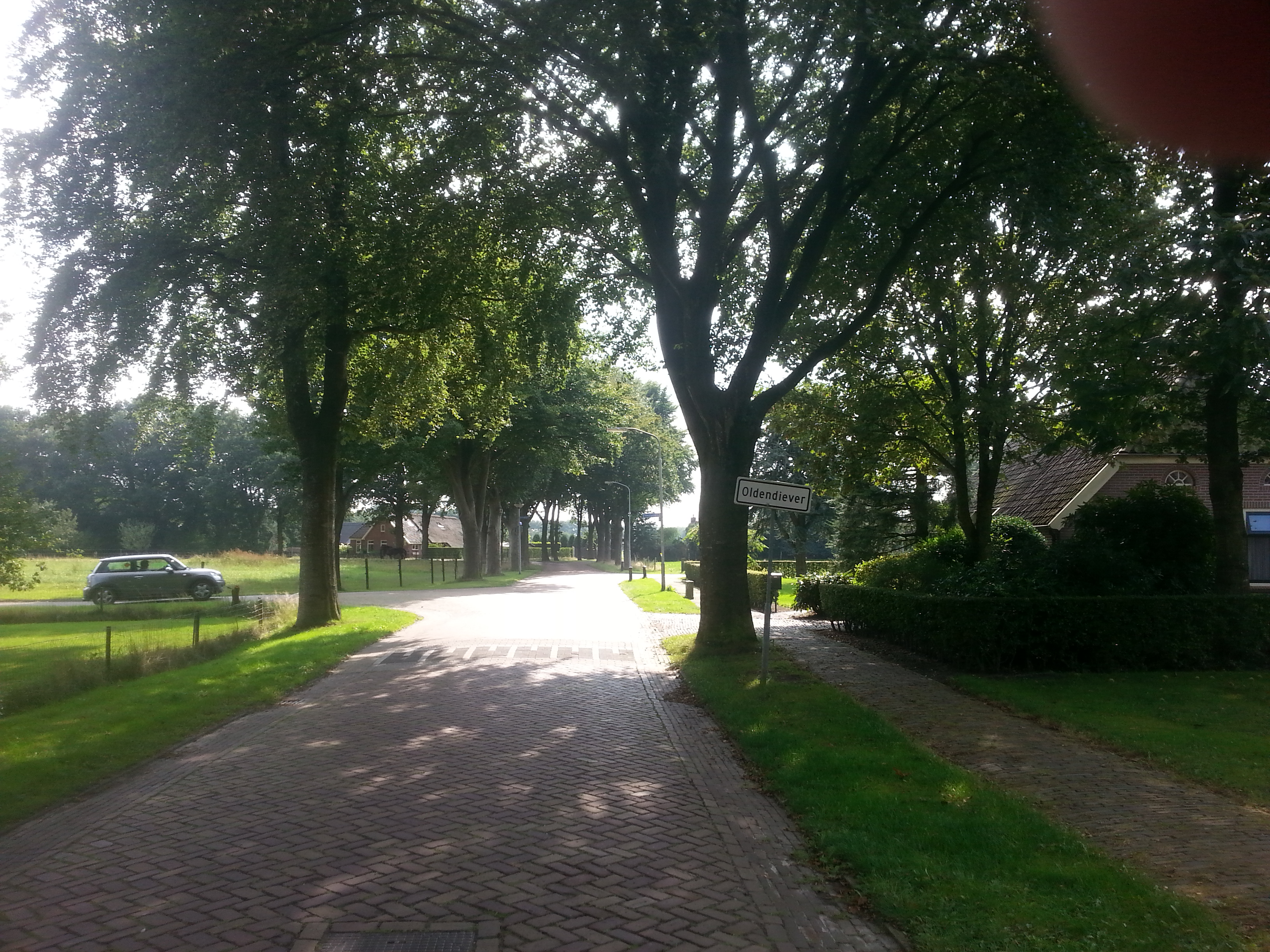 Oldendiever tijdens een fietstocht.